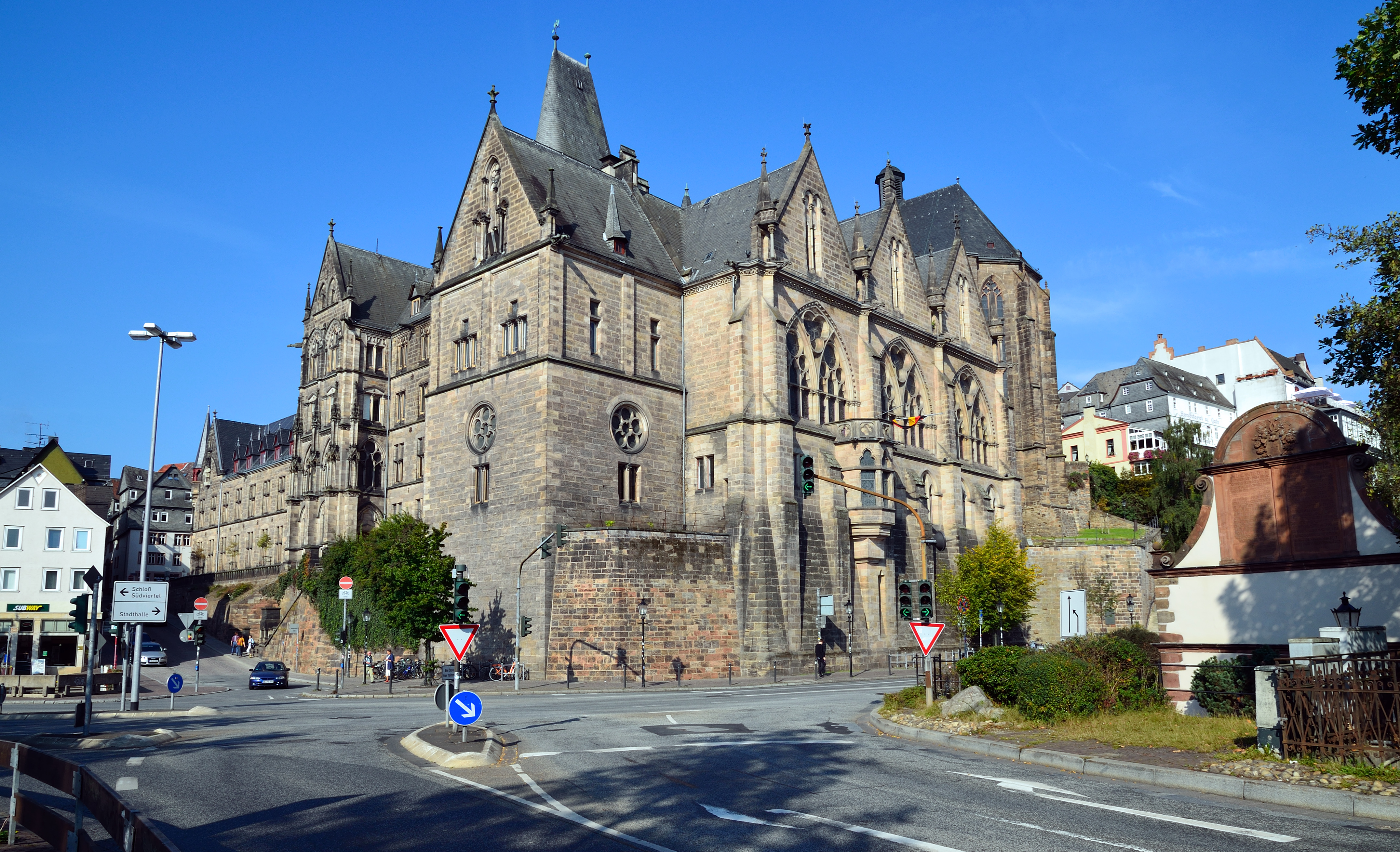 Die Alte Universität in Marburg